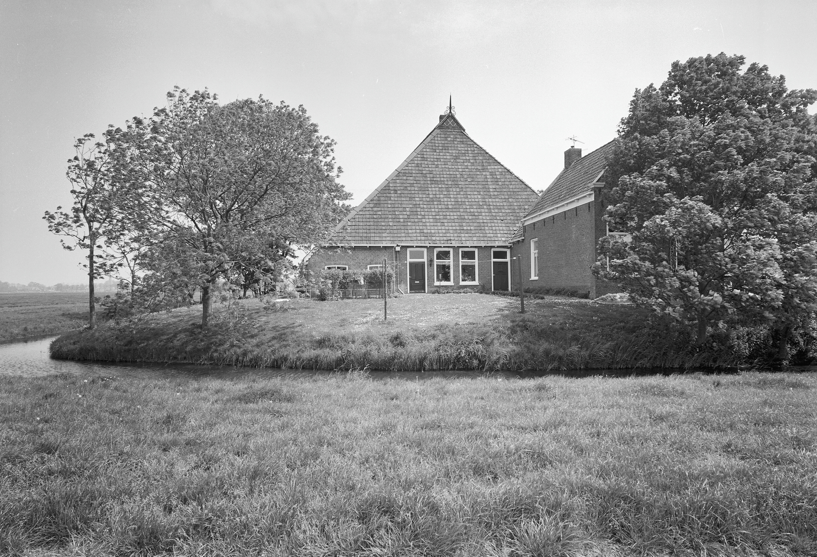 Woonhuizen Diversen: Montzema State, voorzijde